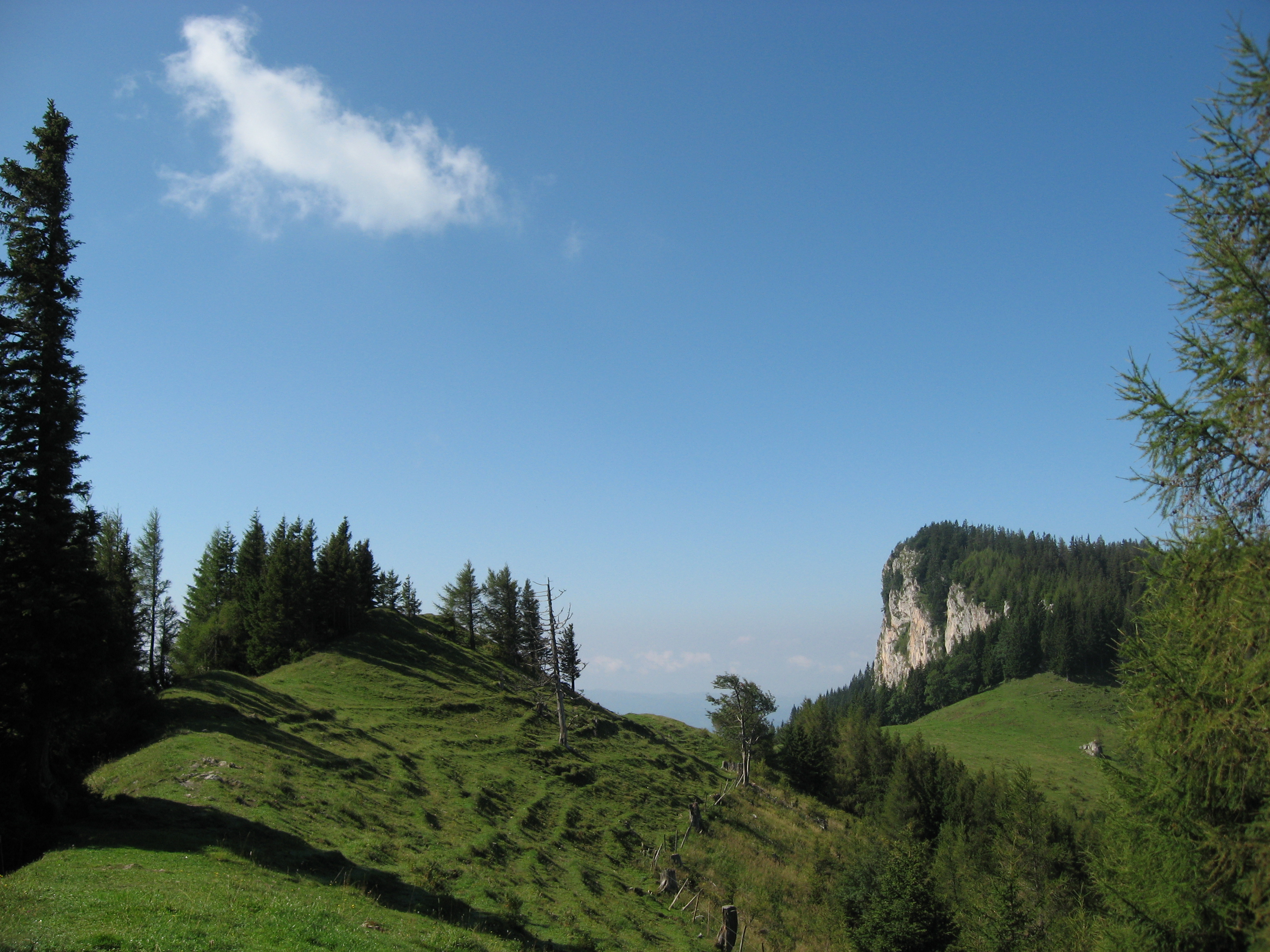 Rote Wand von Nordosten, von der Tyrnauer Alm kommend